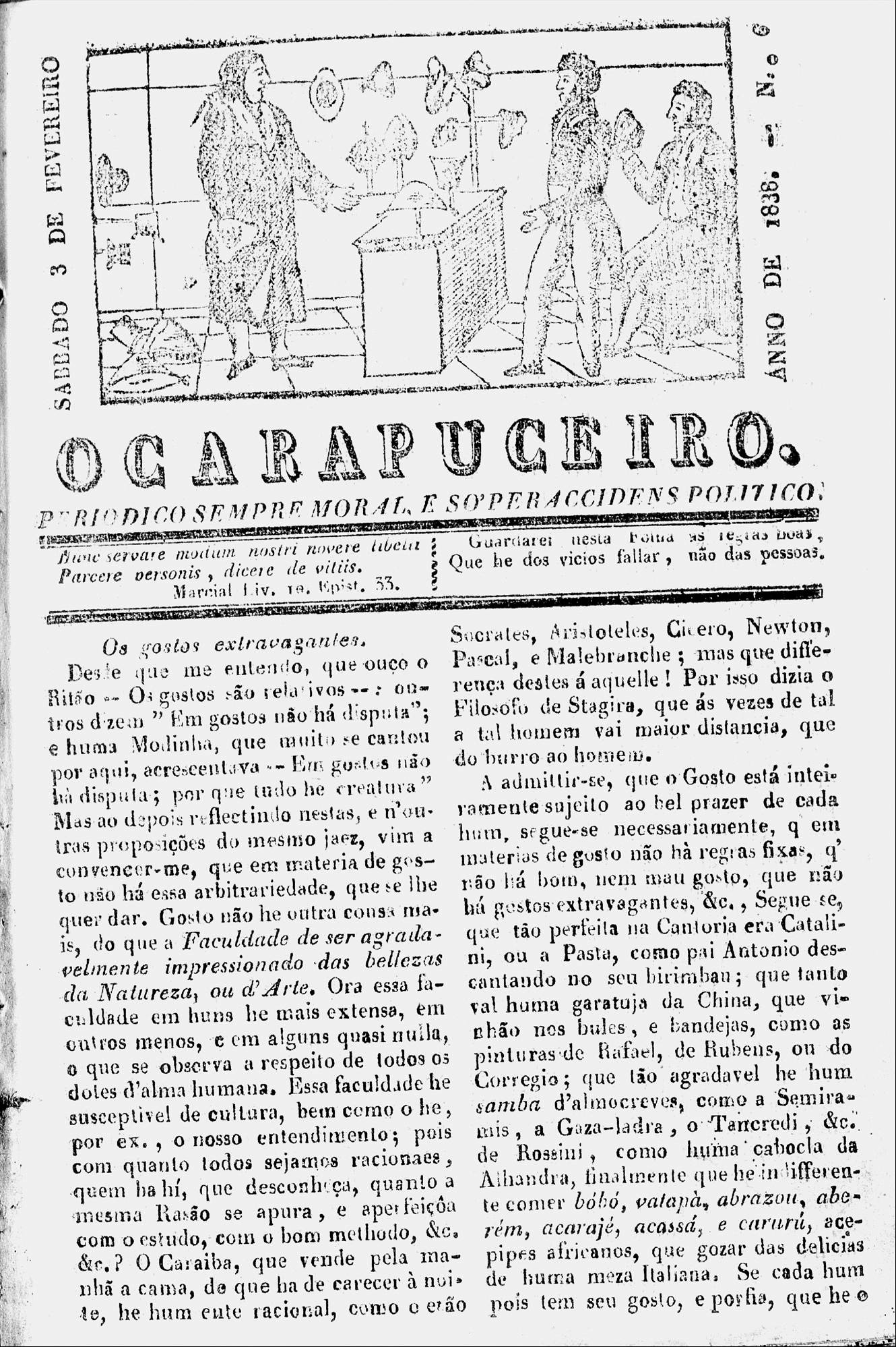 Quest'immagine rappresenta l'articolo, scritto il 3 febbraio 1838 dal frate Miguel do Sacramento Lopes Gama, del giornale "O Carapuceiro", in cui per la prima volta appare la parola "samba".